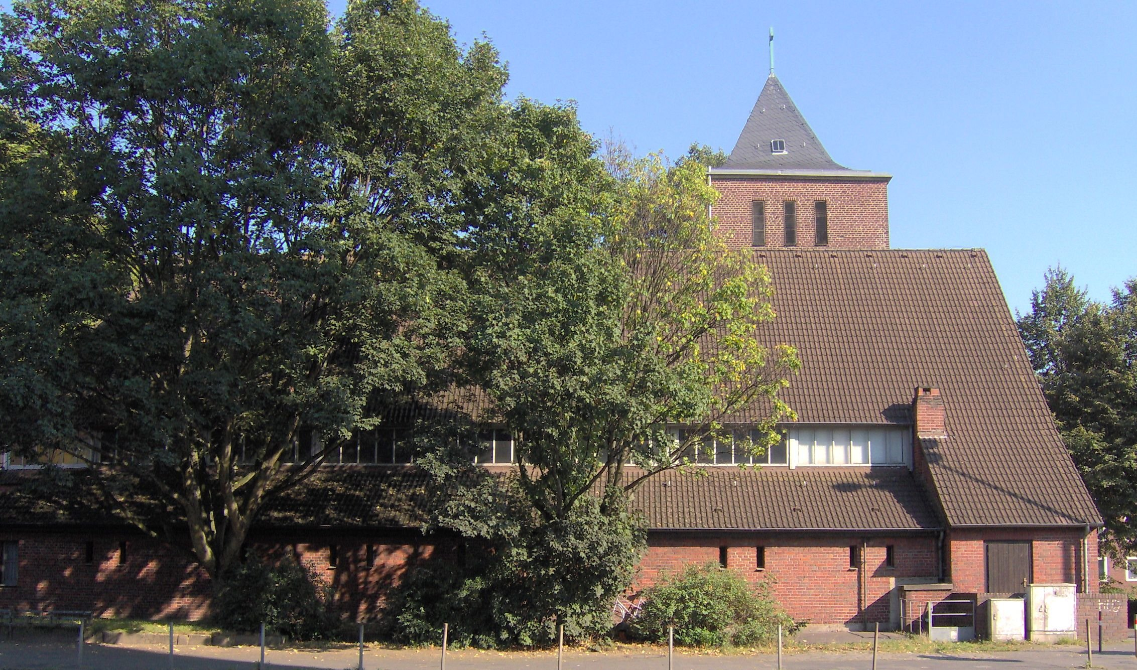 Erlöserkirche in Münster (Westfalen).